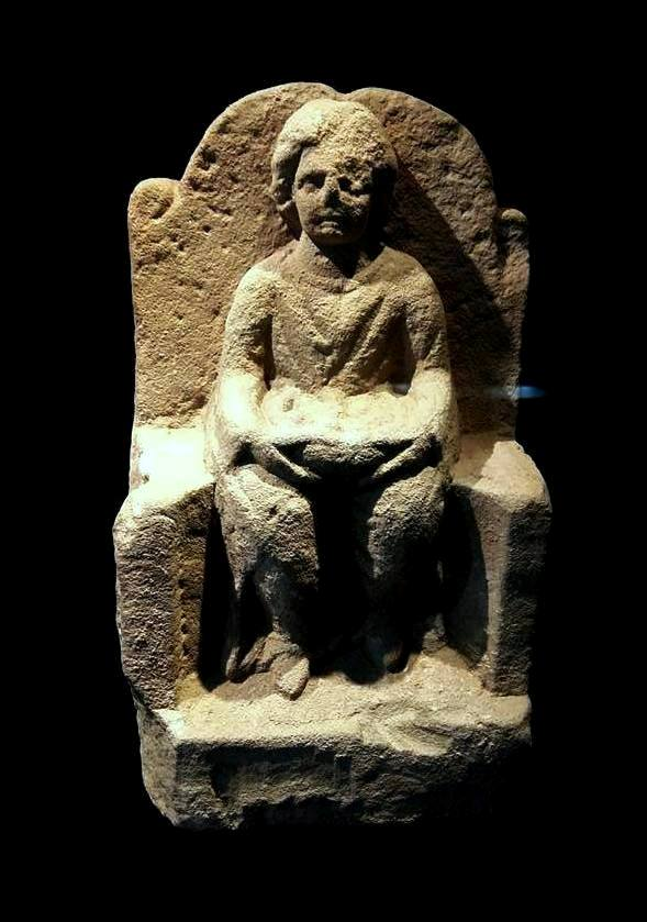 Herecura (Aericura), Sitzfigur, gefunden in Stuttgart-Bad Cannstatt, 2./3. Jahrhundert nach Christus; Württembergisches Landesmuseum